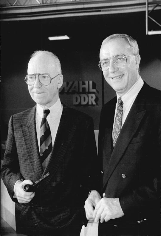 ADN-ZB Settnik 14.3.90 Berlin: Das Wahlstudio der ARD zu den Volkskammerwahlen am 18.3.90 konnte die Presse im Foyer des Palastes der Republik in Augenschein nehmen. Live moderieren der Chefredakteur des SFB, Jürgen Engert (l.) und Fritz Pleitgen, Chefredakteuer des WDR (2.v.l.), von 17.55 Uhr bis zwei Uhr morgens die ersten freien Wahlen in der DDR. "Die DDR wählt" ist eine Gemeinschaftssendung der ARD im Hörfunk unter Federführung des WDR."